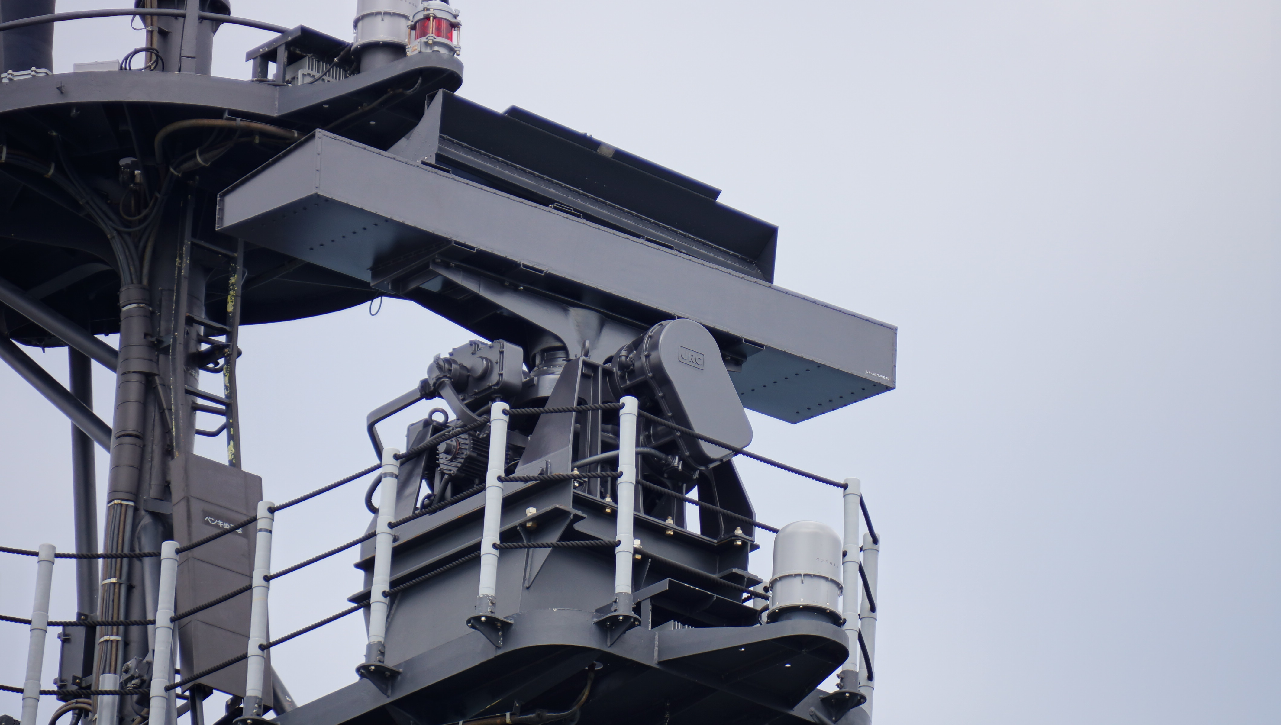 海上自衛隊 護衛艦くらま（DDH-144） OPS-28水上レーダー。 13年10月27日 神戸港にて。